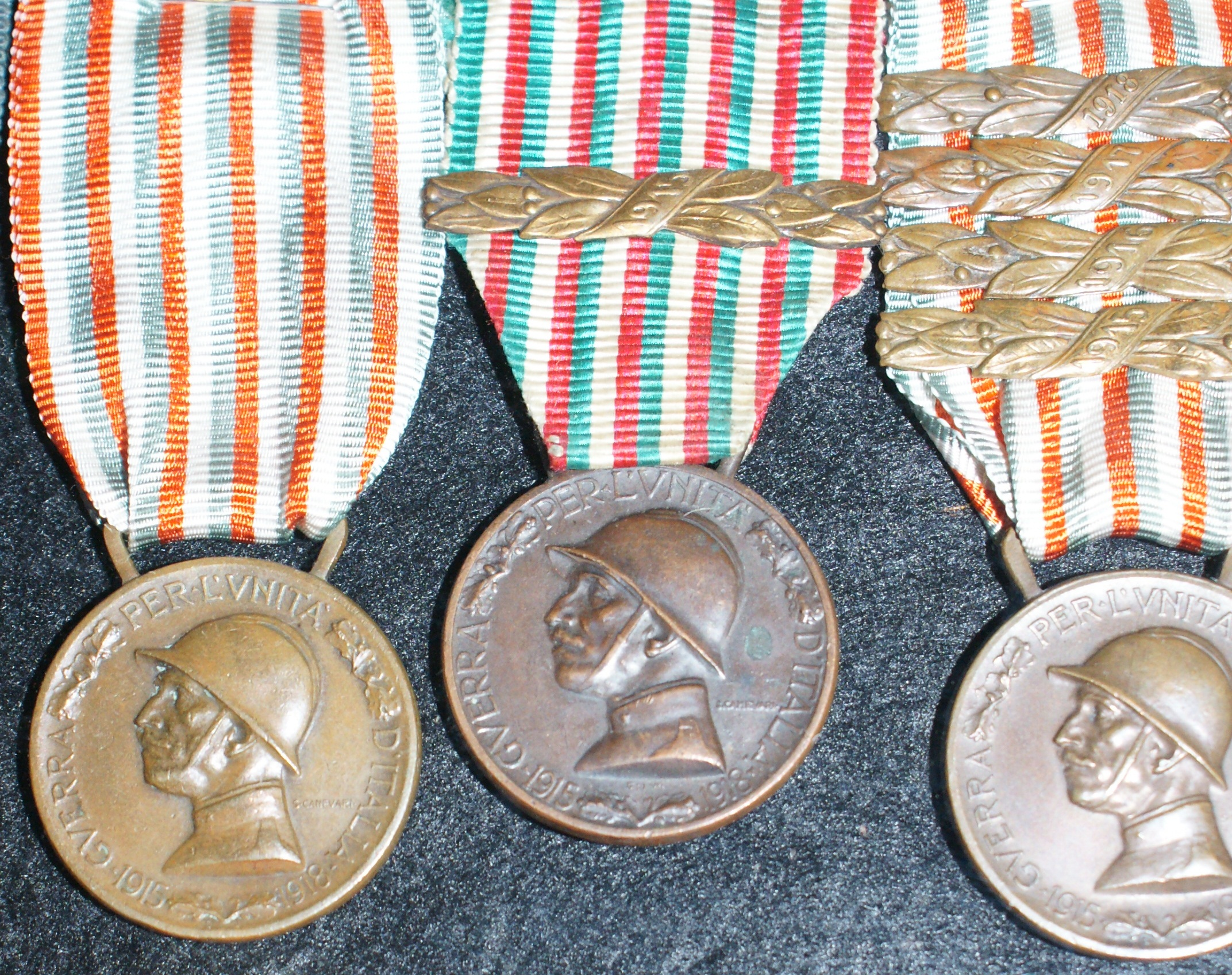 Medaglia commemorativa della guerra italo-austriaca 1915 – 18. Collezione privata